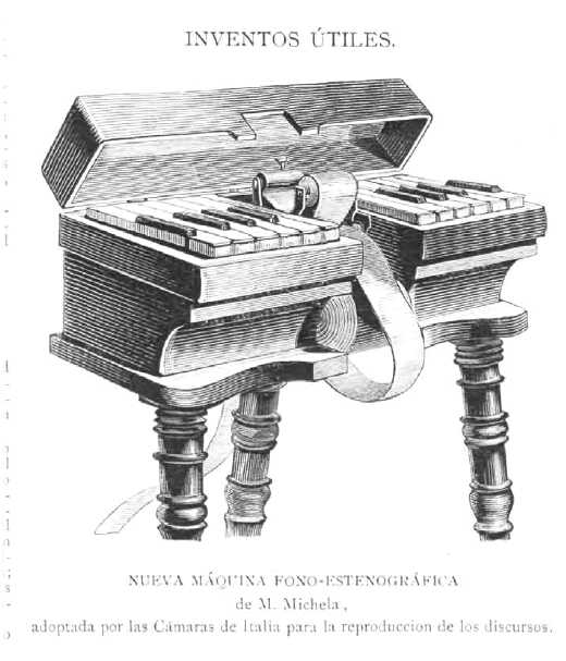 Nueva maquina fono-estenografica de M. Michela adoptada por la Camaras de Italia para la reproduccion de los discursos